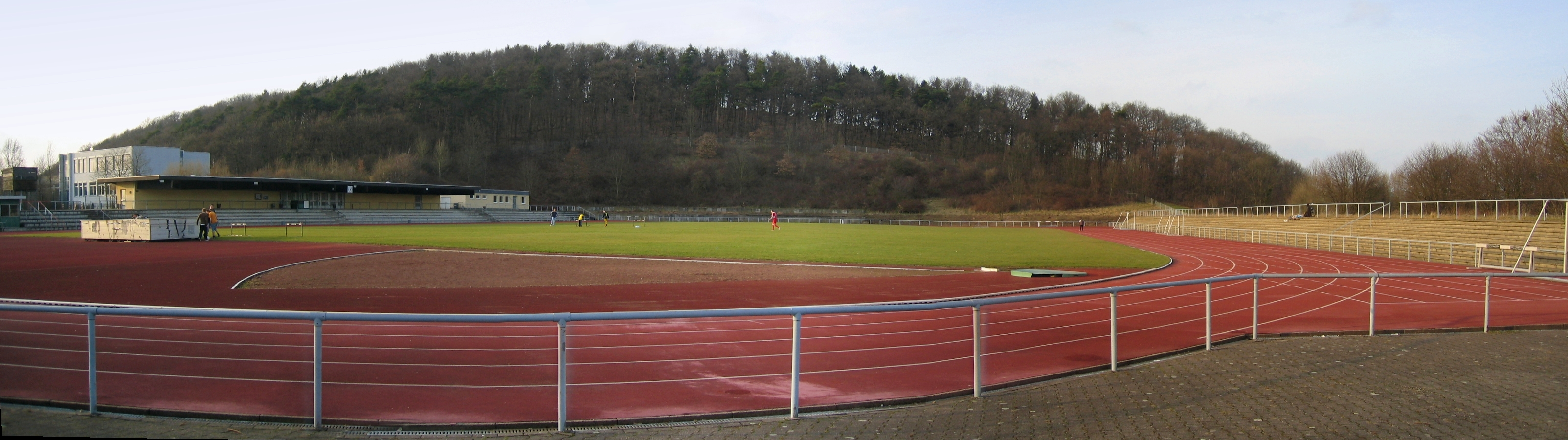 Panorama Leichtathletikstadtion „Am Hemberg“ in Iserlohn (Hemberg-Stadion).